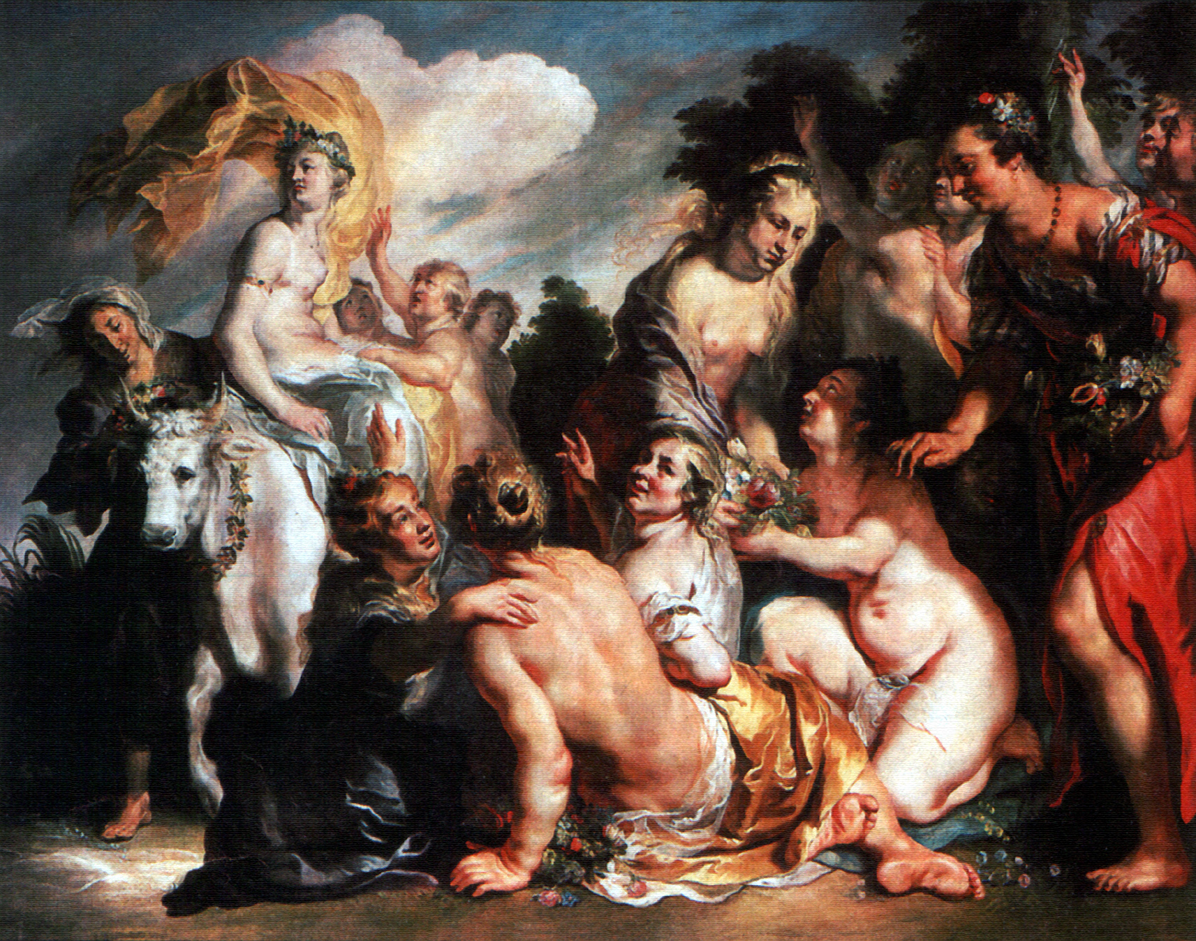 Europa sitzt auf dem Stier, in den sich Zeus verwandelt hat, umgeben von ihren Gefährtinnen, die auf das weitere Geschehen warten.